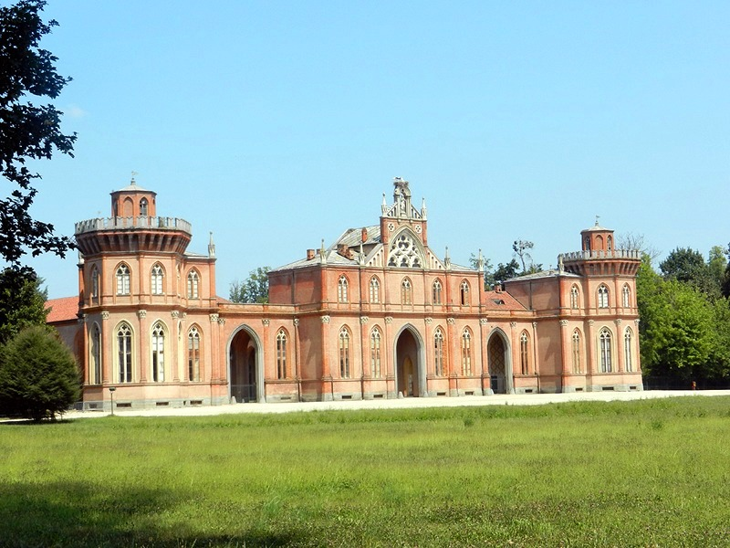 Racconigi - Margaria del Castello Reale